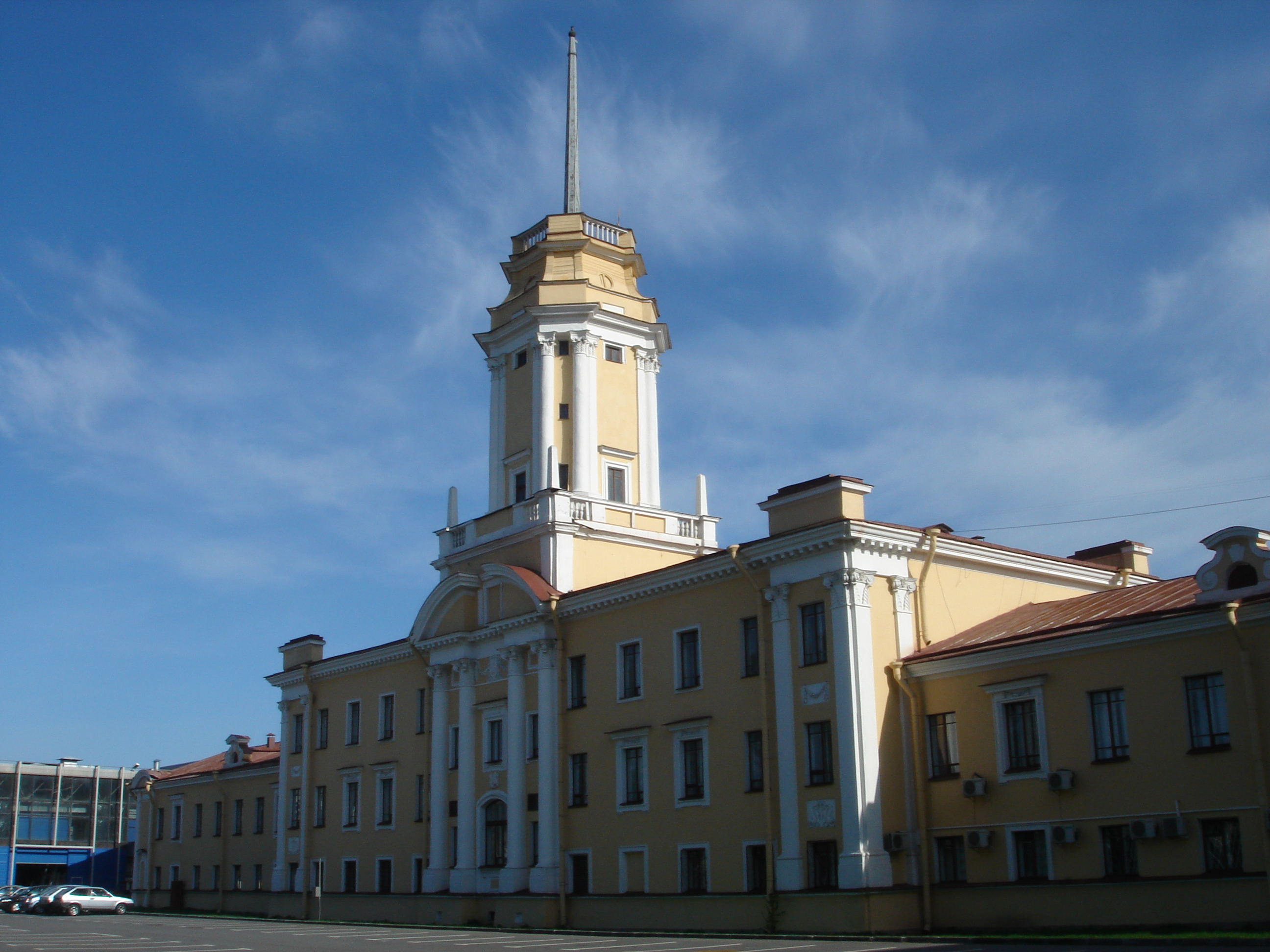 9 павильон в Ленэкспо с 2007 года является штабом фонда "ПМЭФ".